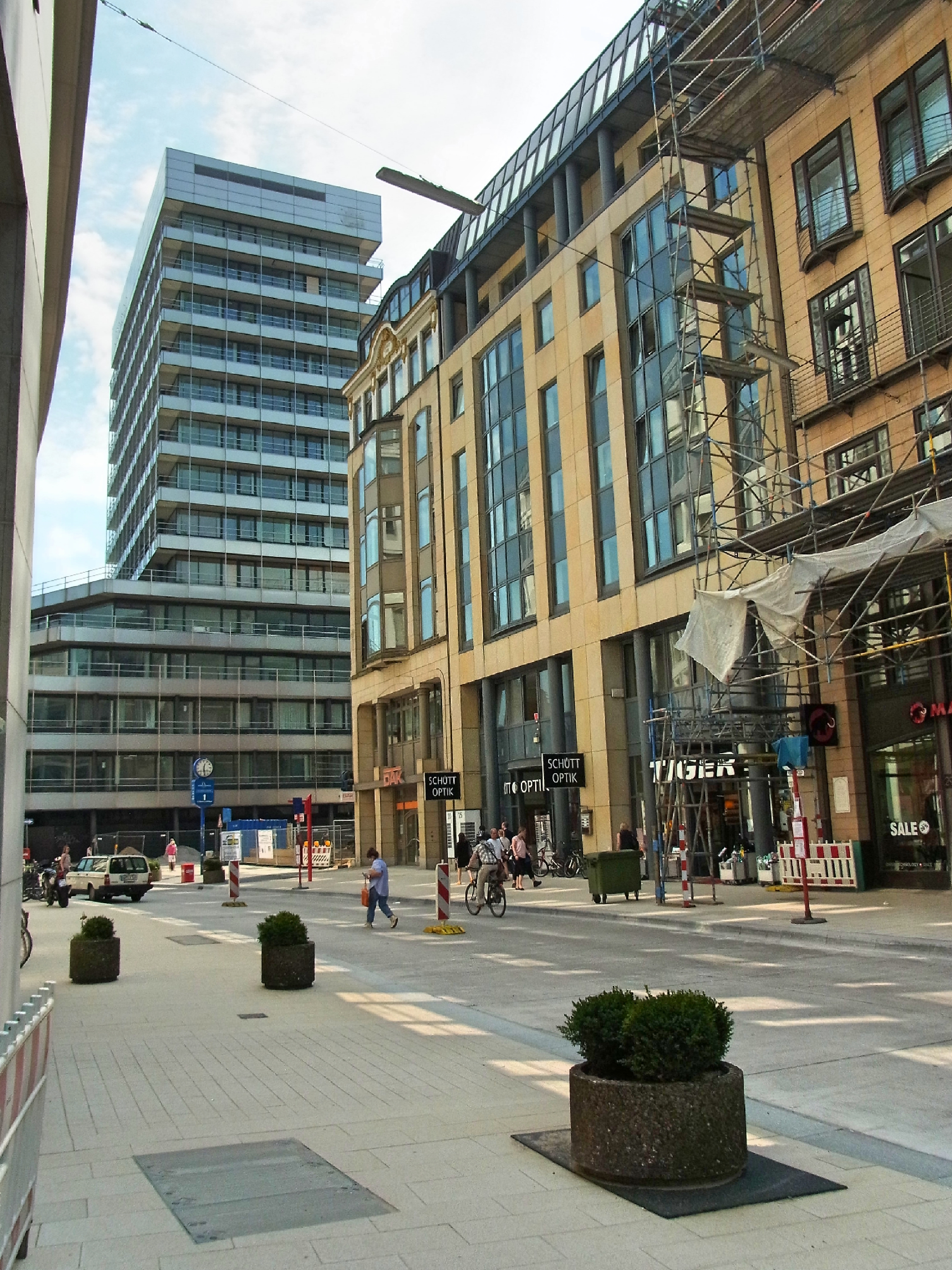 Der Große Burstah ist eine Straße in Hamburg-Altstadt. Sie verläuft ab der Großen Johannisstraße in einem Rechtsbogen Richtung Rödingsmarkt. Nach aufwendiger Fahrbahnsanierung und Neubebauung befinden sich auch einige Gebäude zur Zeit im Umbau: Stand Juli 2016. Blickrichtung stadteinwärts auf das ehemalige Allianz-Gebäude.